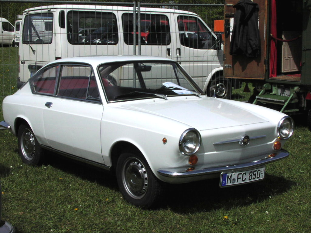 Fiat 850 Coupé Serie 1